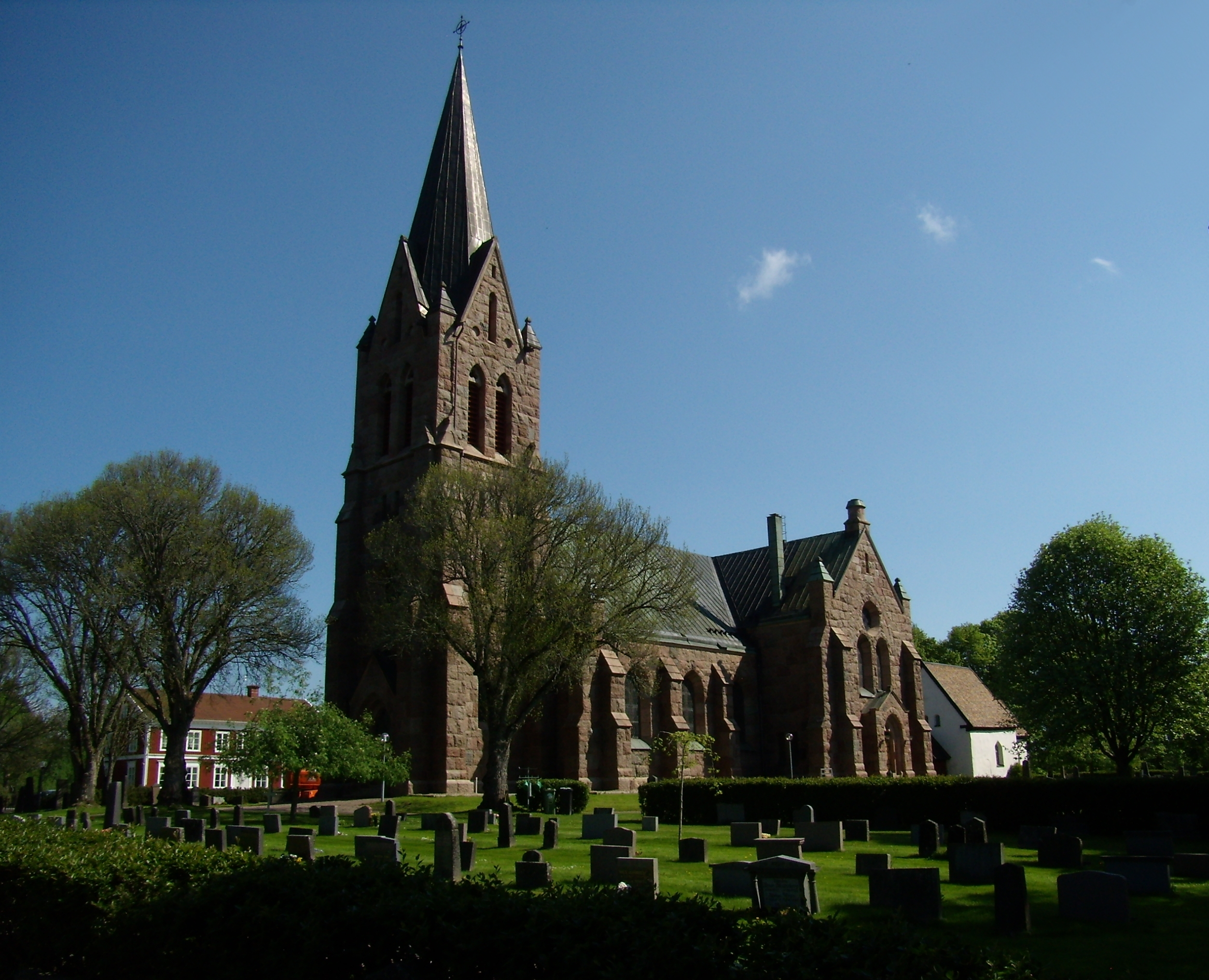 Norra Solberga nya kyrka, med den gamla kyrkan synlig intill.